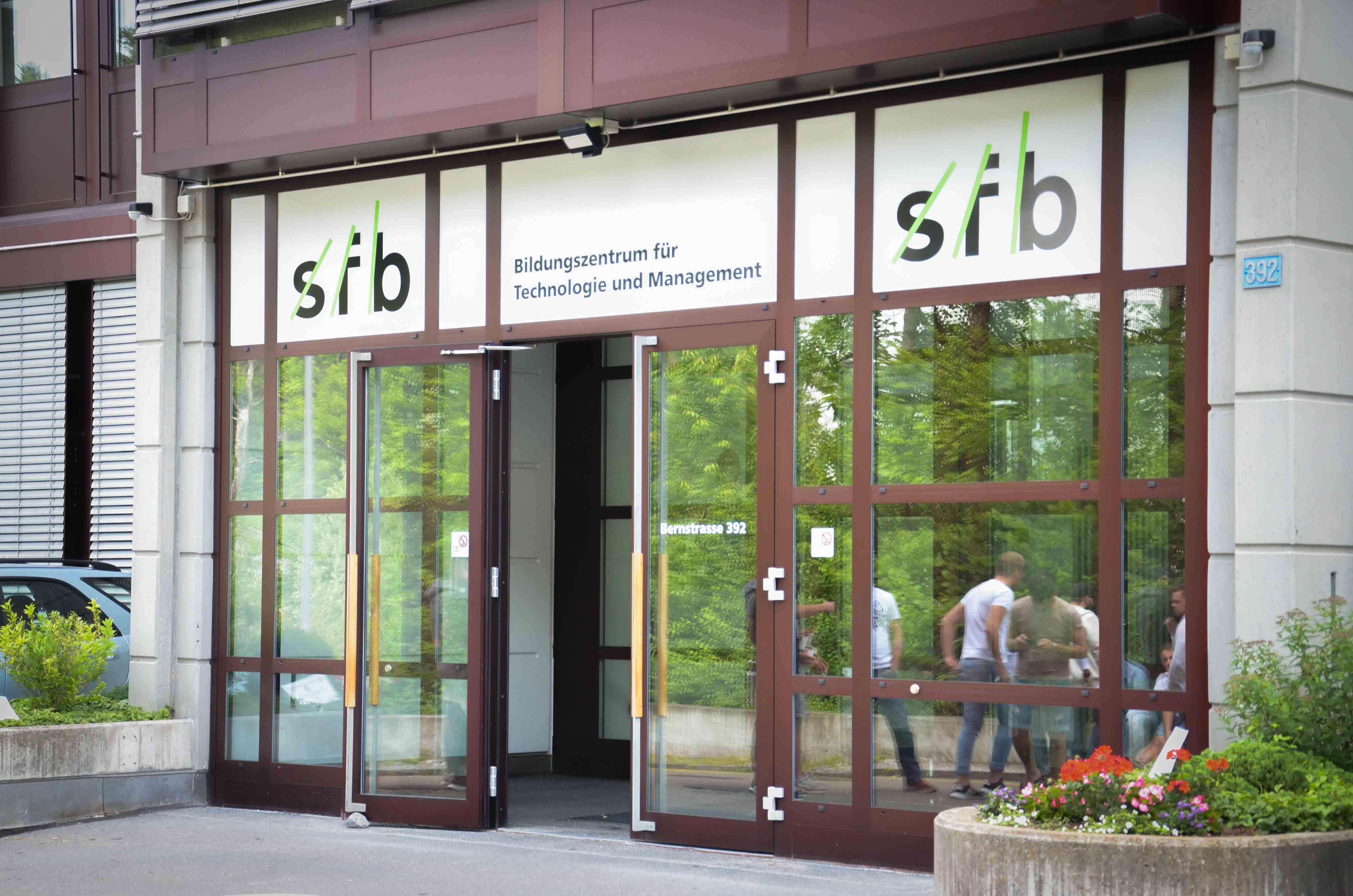 Eingang in das sfb-Schulgebäude an der Bernstrasse 394, 8953 Dietikon